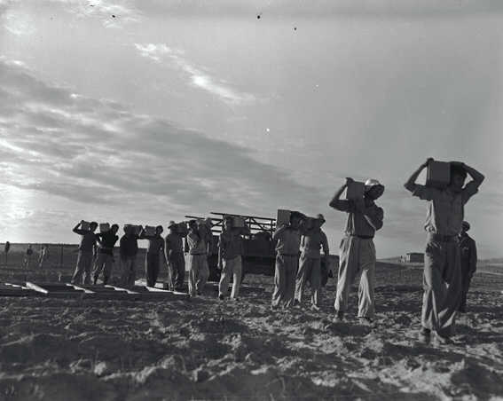 "חלוצה" - בבוקר העליה ל"חלוצה"